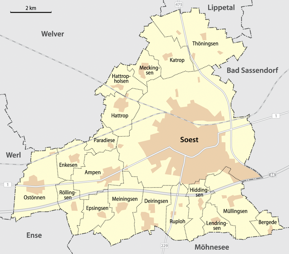 Karte der Ortsteile von Soest